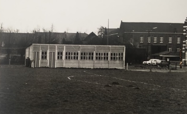 Eerste voetbalkantine van VC E.Houtem gebouwd in 1970. De kantine werd later uitgebreid en tenslotte in 1988 vervangen door de huidige infrastructuur.